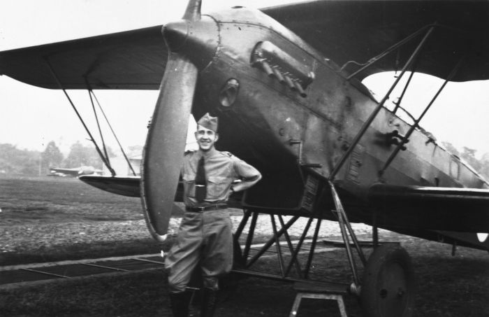 Foto. H.J. Otten poseert bij een vliegtuig, Luchtvaart Afdeling Andir Remark: most probably Fokker C.V of ML-KNIL